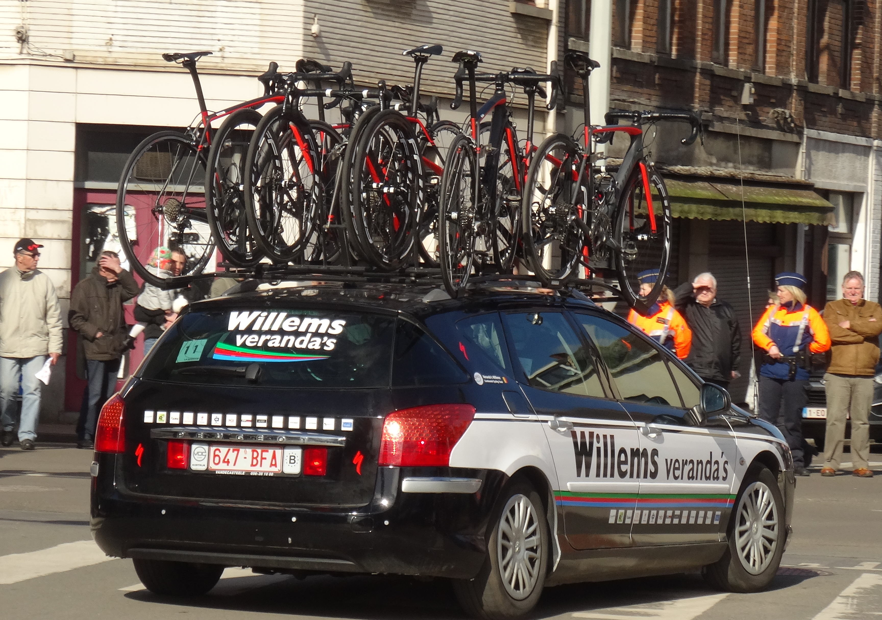 Reportage réalisé le mercredi 4 mars à l'occasion du départ du Samyn des Dames 2015 et du Samyn 2015 à Quaregnon, Belgique.